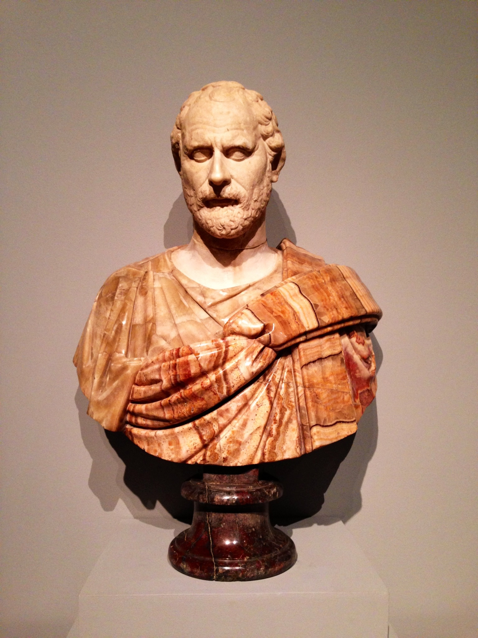 Buste de Démosthène, I-IIe siècle après J.-C., marbre blanc, onyx, marbre noir, musée des Beaux-Arts de Tours.